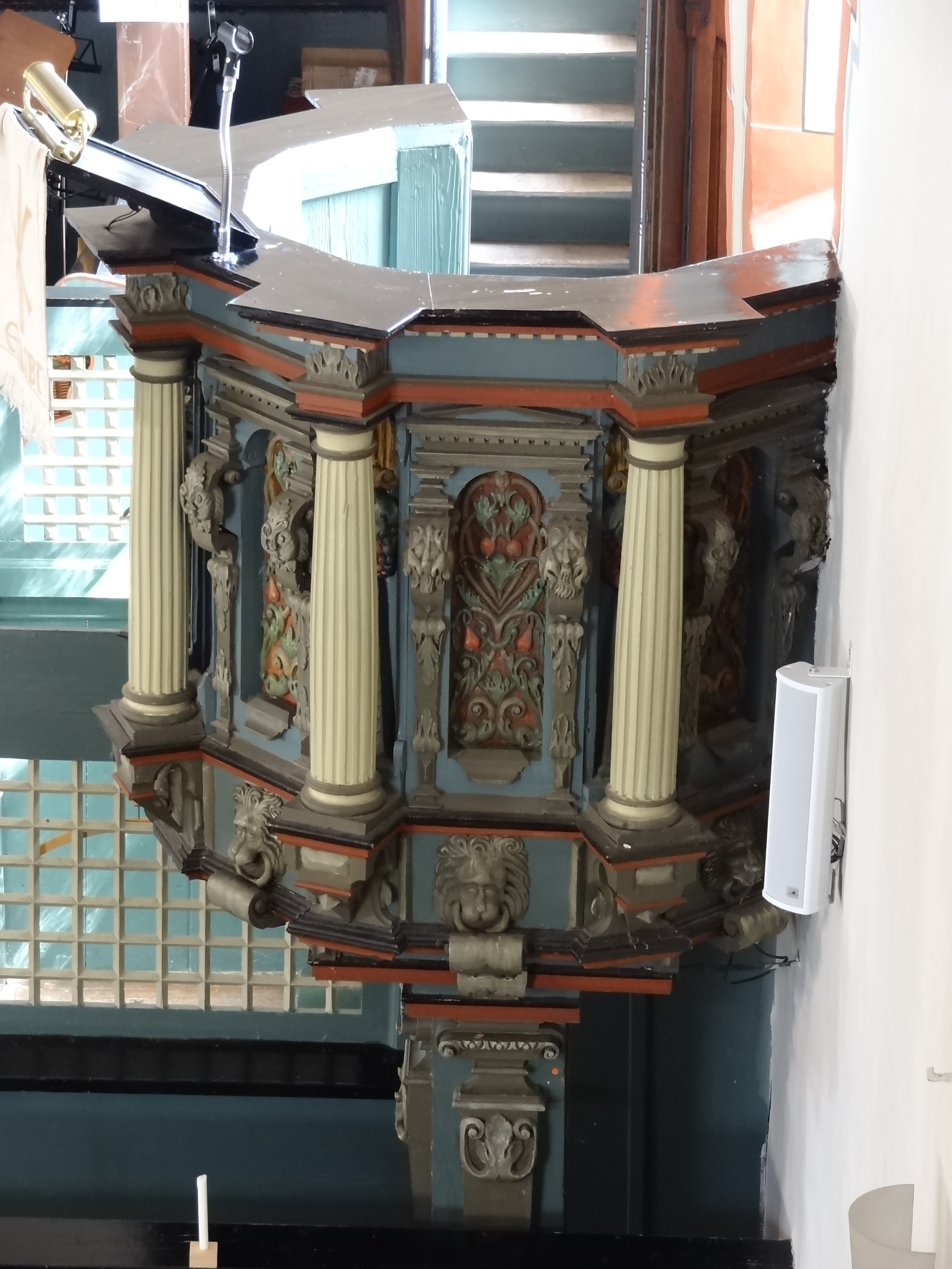 Evangelische Kirche Wohnbach